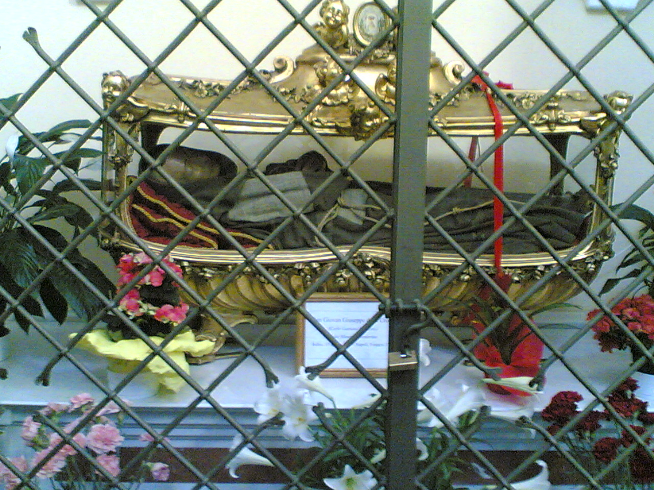 Urna contenente le Reliquie di San Giovanni Giuseppe della Croce (1654-1734)